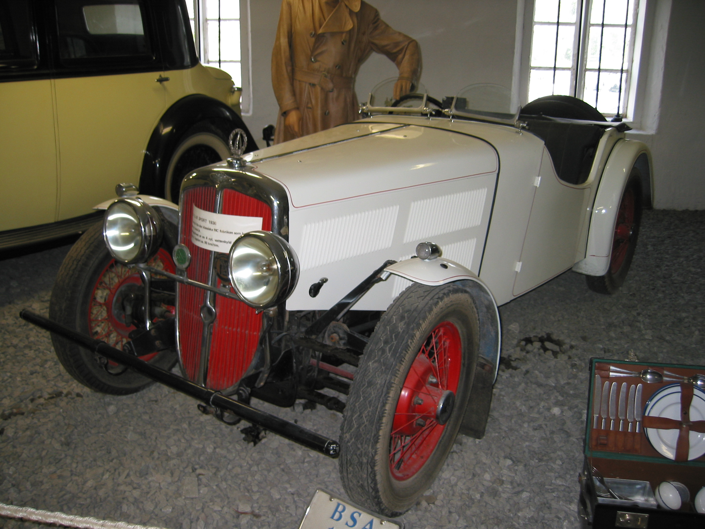 BSA 1936